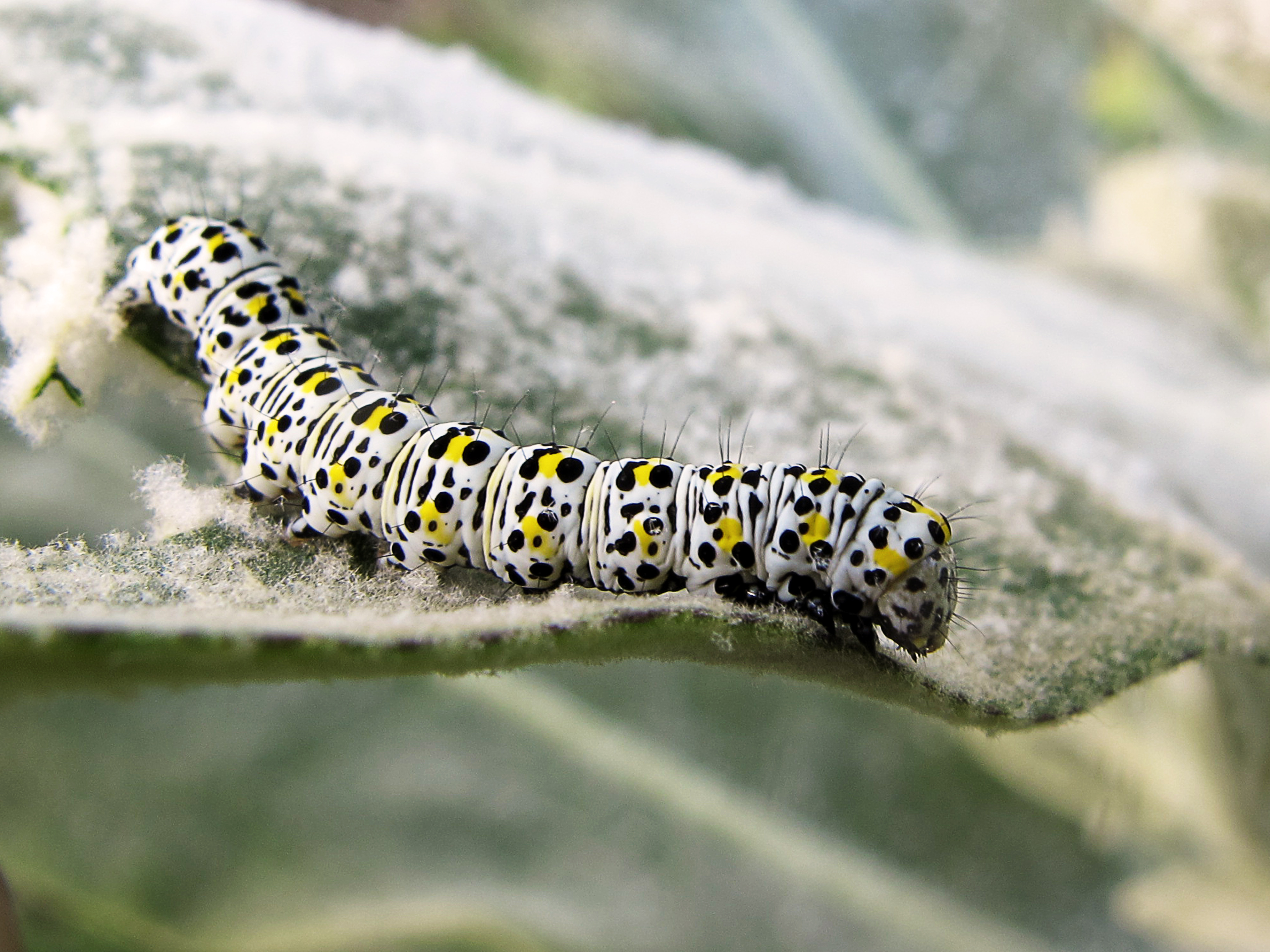 Oruga del verbasco * Shargacucullia verbasci